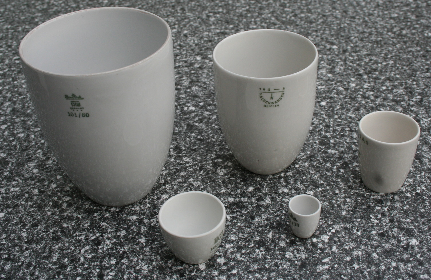 Porzellantiegel